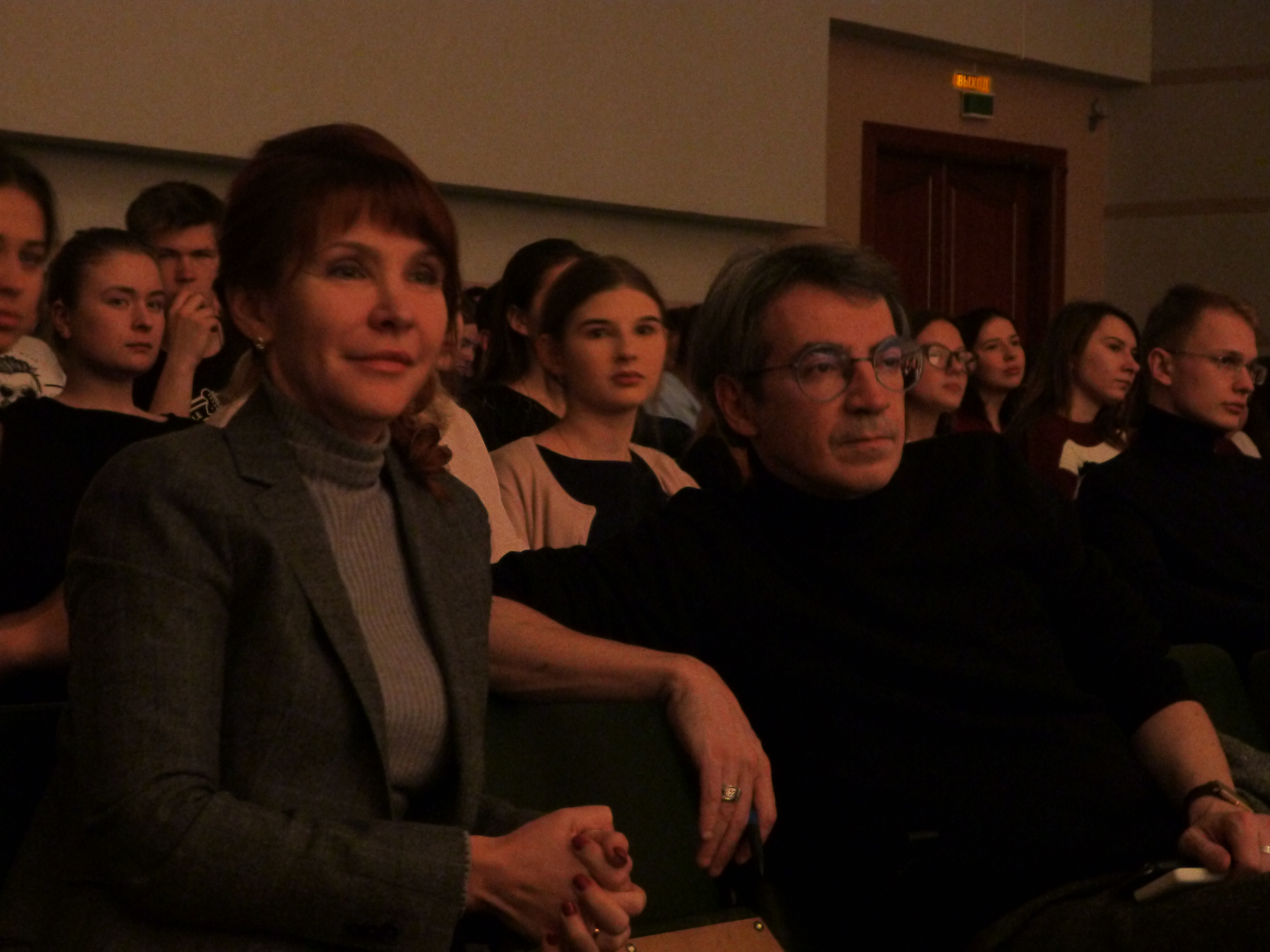 Евгения Набойченко и режиссер Илья Слободчиков игра УГМУ 2019 год